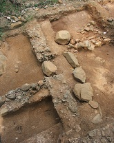 travail personnel